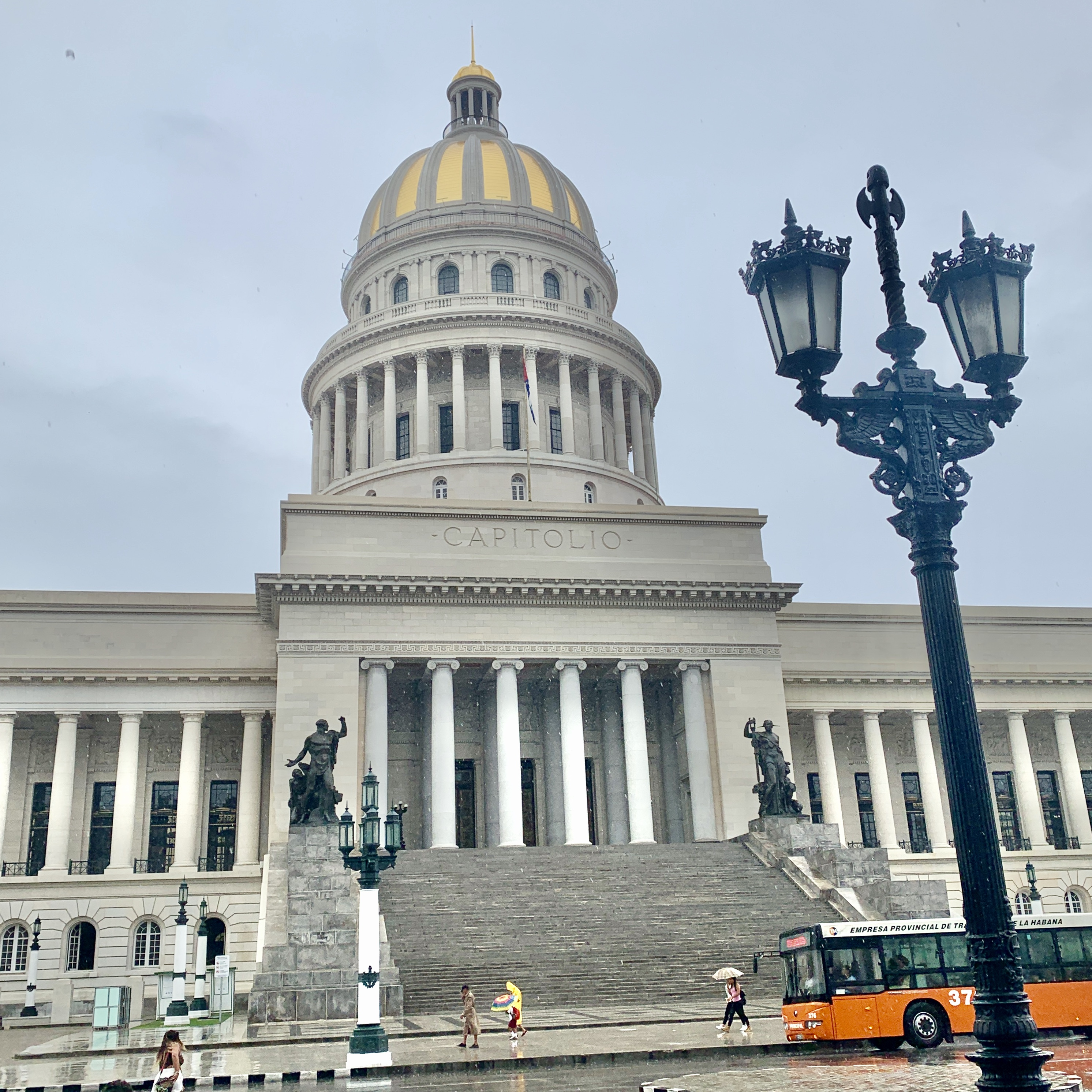 Capitolio de La Habana, Cuba.